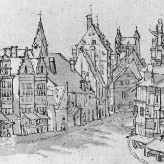 Hoge Brugstraat ca.1669, reproductie van tekening in bezit van Gemeente Archief, toegeschreven aan Valentijn Klotz.